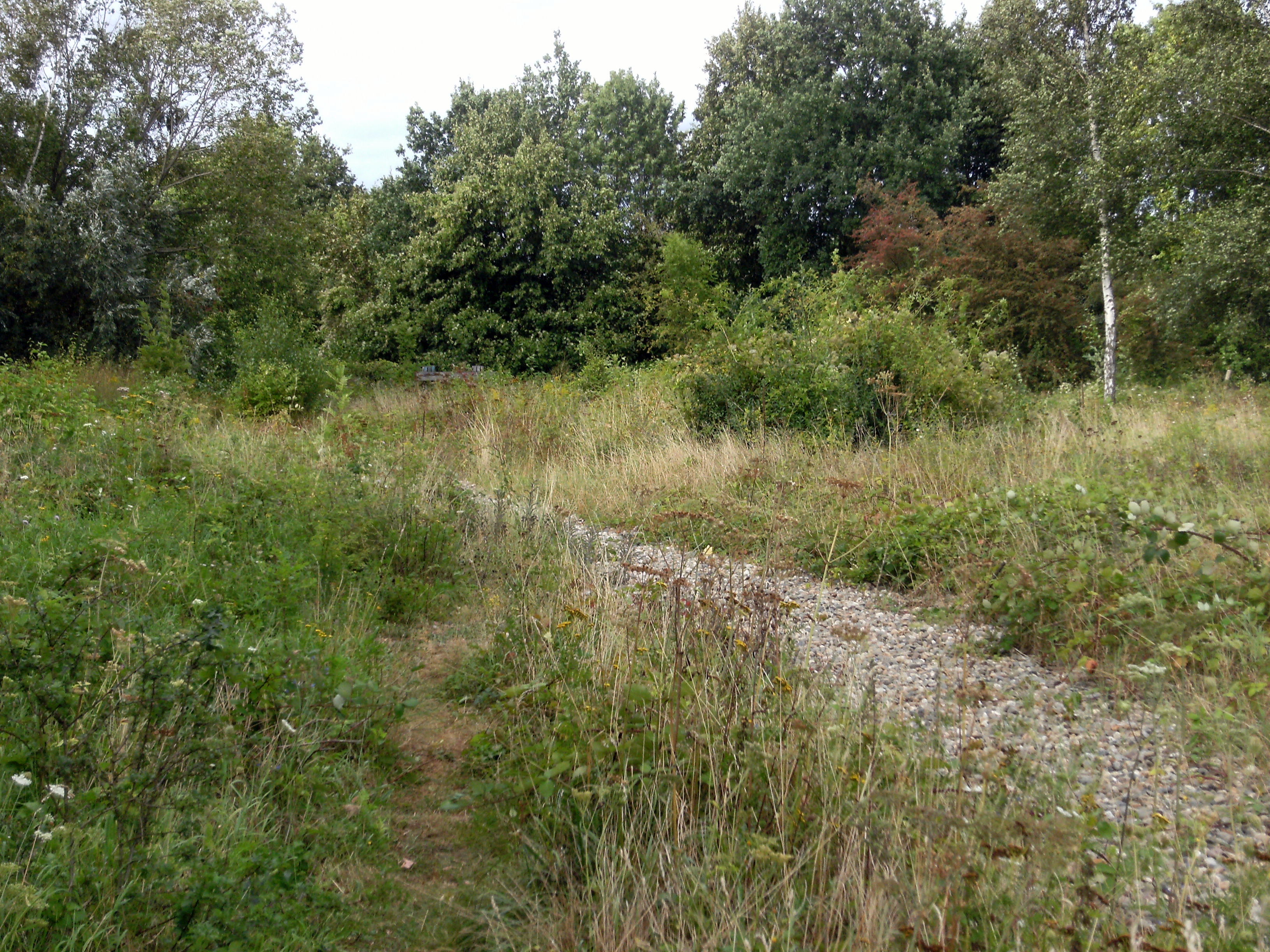 Maastricht 2012 op oud rangeerterrein Bosscherveld